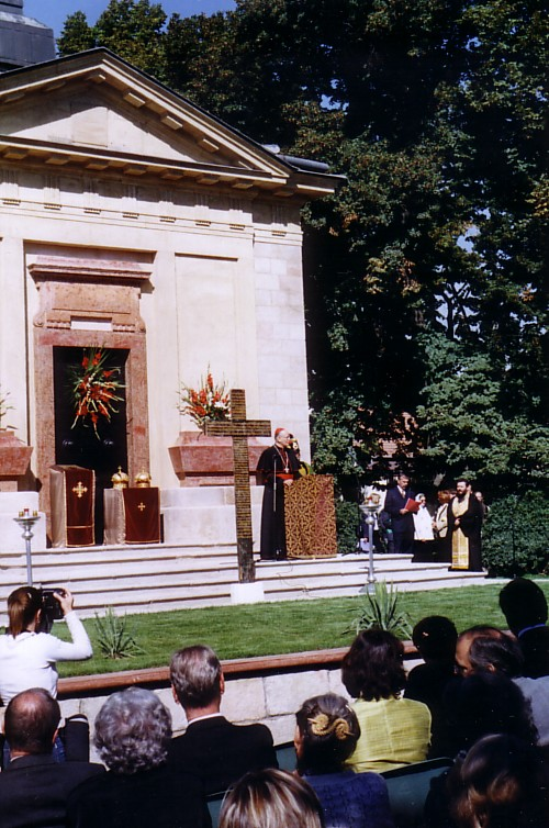 Neubestattung der Großfürstin Alexandra Pawlowna Romanowa (gest. 1801) in Üröm / Ungarn